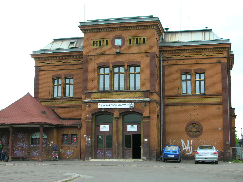 Wałbrzych - Dworzec Wałbrzych - Główny.